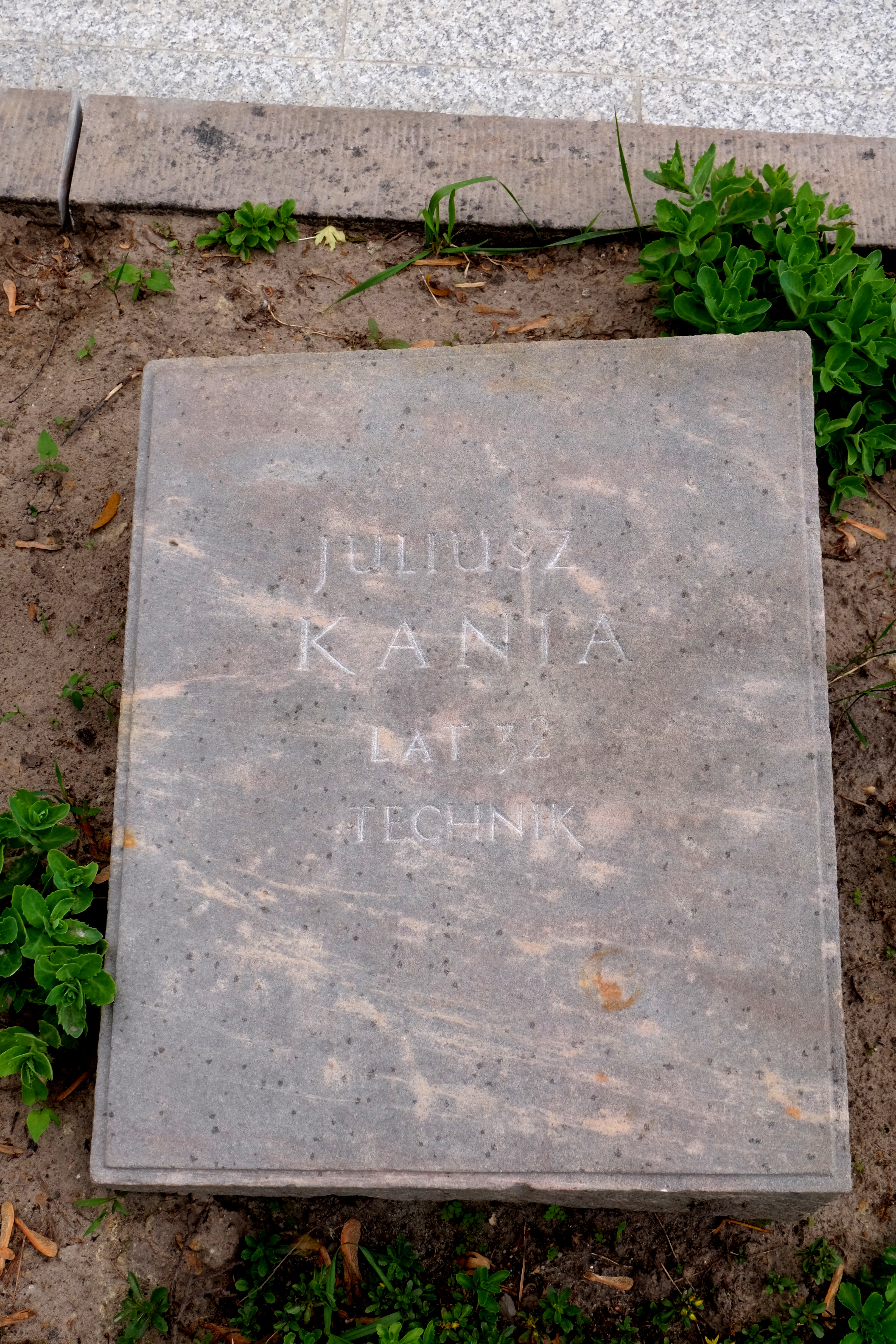 Grób działacza komunistycznego Juliusza Kani na Cmentarzu Wojskowym na Powązkach w Warszawie